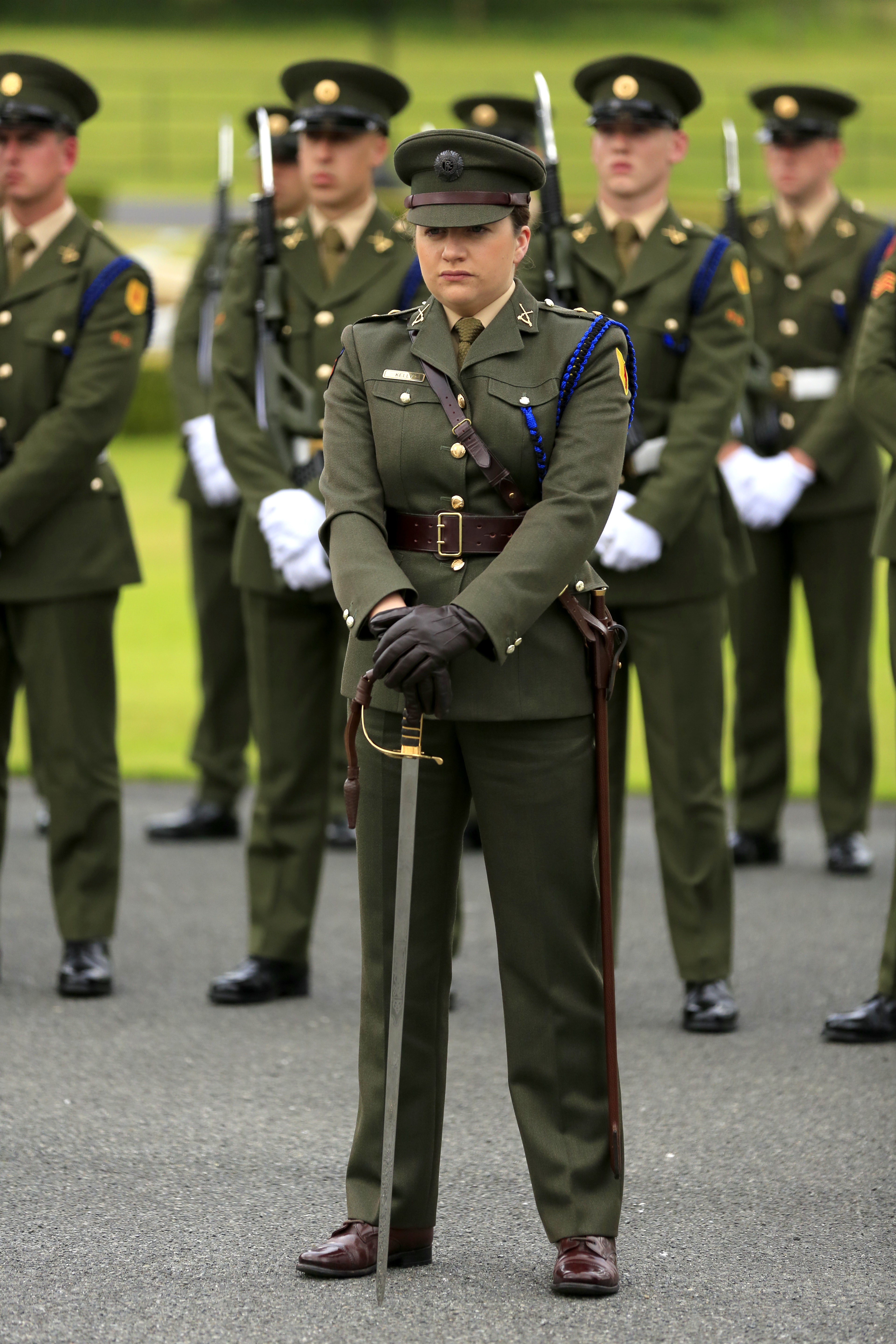 7 Inf Bn at Áras an Úachtarán